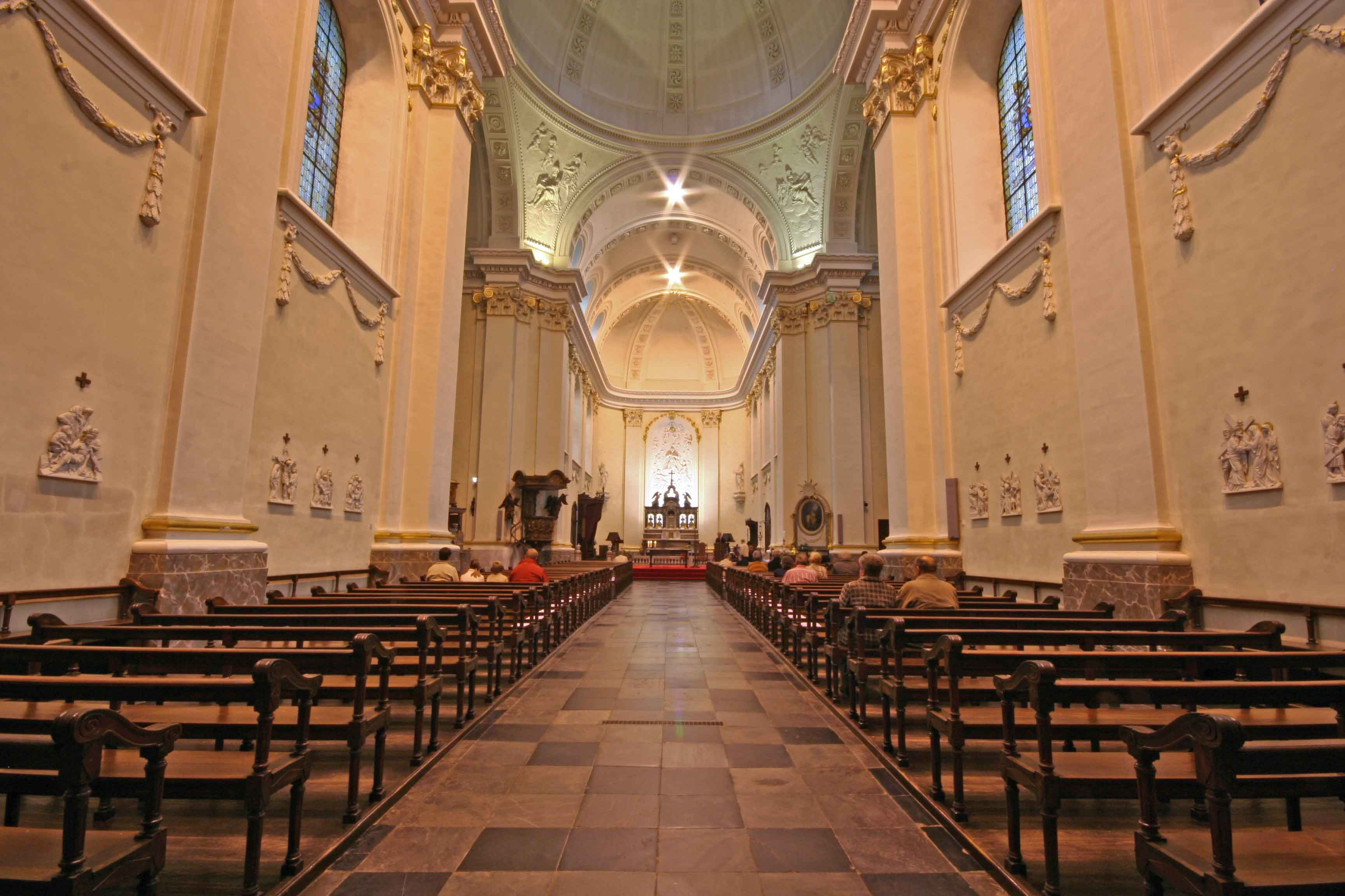 KAT MAL